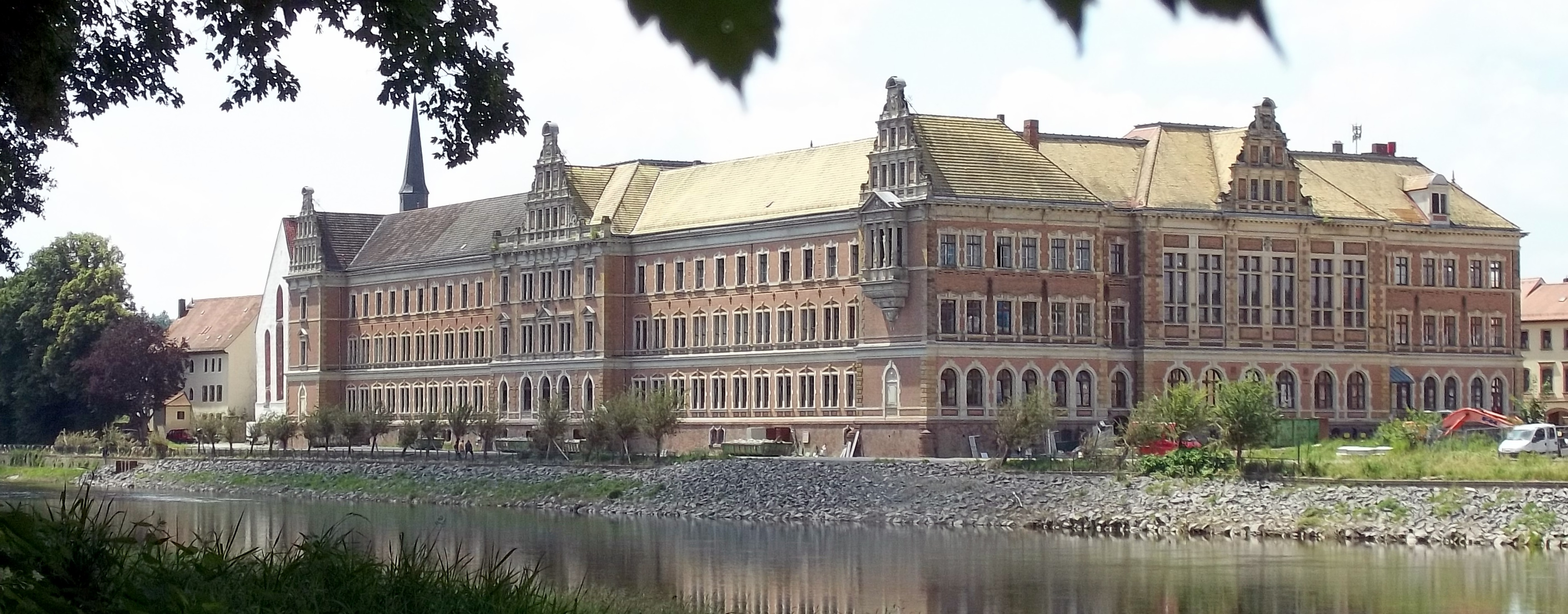 Das Gymnasium St. Augustin, die einstige Landes- und Fürstenschule Grimma, von der Mulde aus - Foto: Holger Zürch